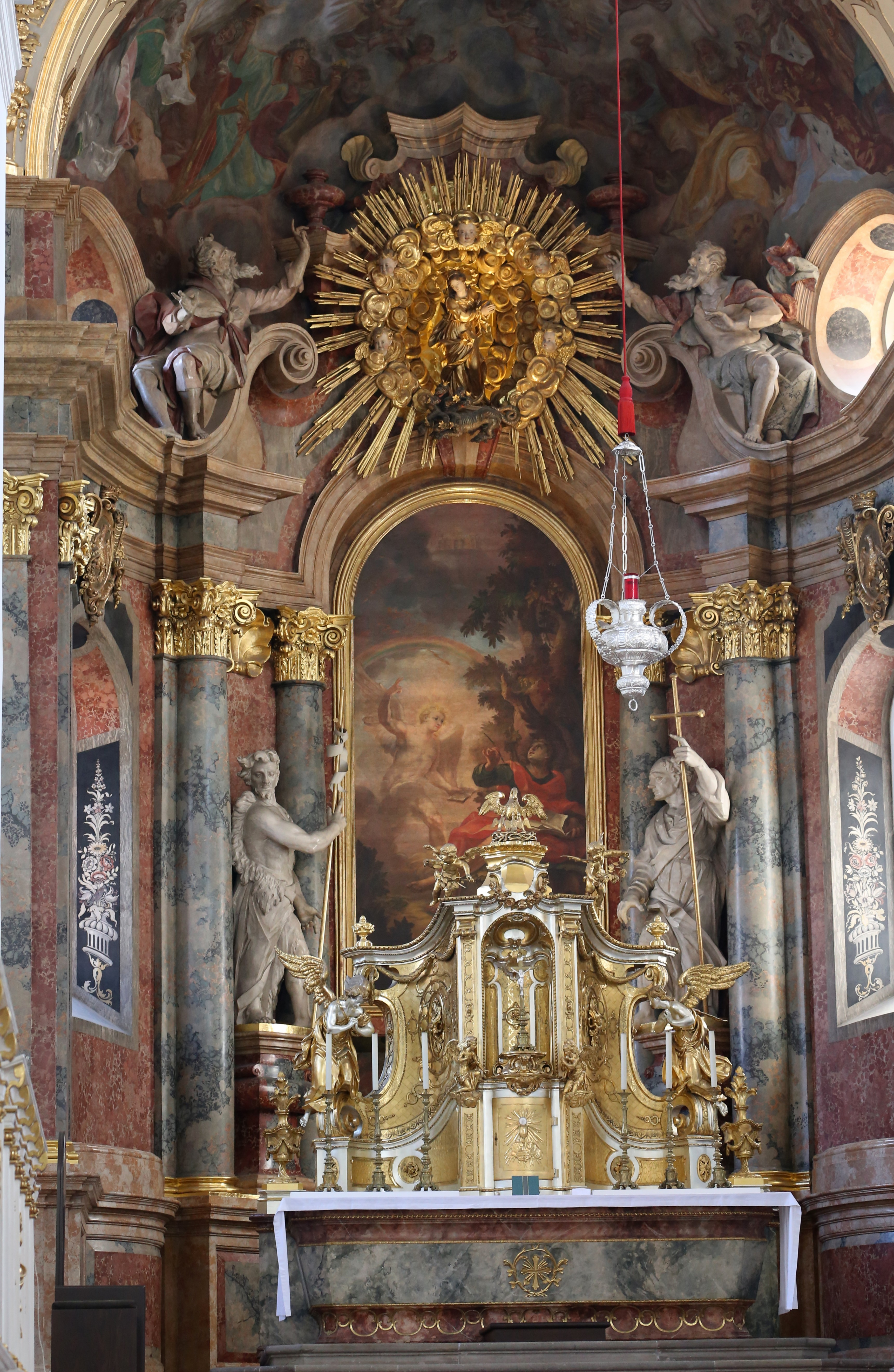 Kürschnerhof 2 a, Würzburg; Katholische Neumünsterkirche, ehemaliges Kollegiatsstift, erste Bischofskirche über den Gräbern der Frankenheiligen im 8. Jahrhundert, 855 Zerstörung, Neugründung als Stift St. Johannes, Maria und Kilian 1060, katholische Pfarrkirche Neumünster seit 1808, dreischiffige Pfeilerbasilika über kreuzförmigem Grundriss, erhöhter Chor mit Rundapsis über Krypta, seitlicher oktogonaler Turm mit reicher Sandsteinornamentik, Spätromanik, um 1190–1250, barocke Zwiebelhaube 18. Jahrhundert, westliches Kuppeloktogon mit Laterne und vorgestellter Portalfassade mit Figuren, Barock, vermutlich Kollektivplanung unter Führung Joseph Greissings, 1711–1716, Figurenschmuck von Jakob von der Auwera, Freitreppe 1719, Wiederaufbau bis 1950; mit Ausstattung.